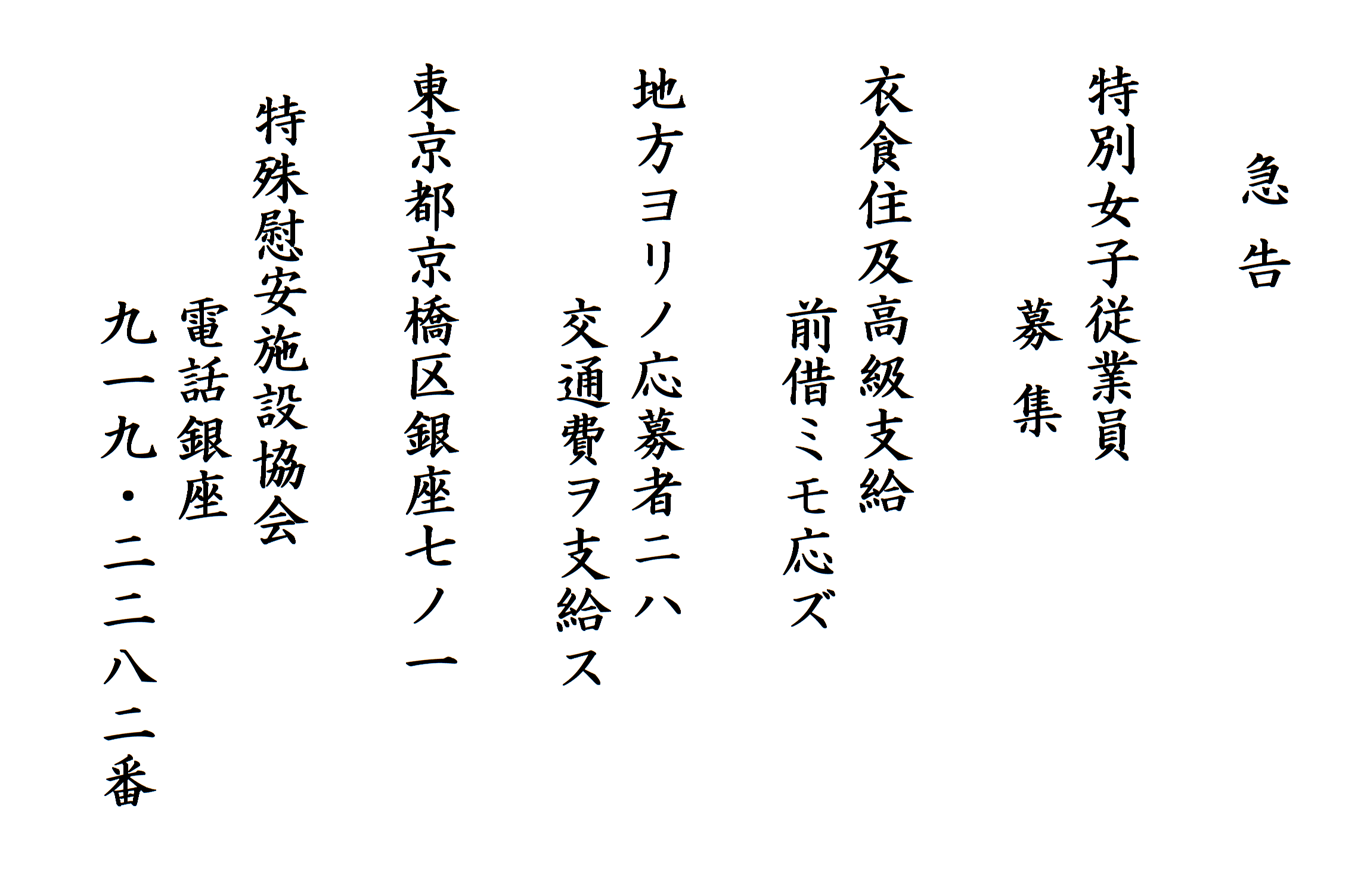 特殊慰安施設協会の広告（内容）・毎日新聞1945年9月4日